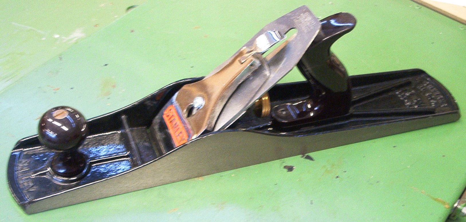 zelf gemaakte foto voor het publiek domein. Martink. Categorie:Afbeelding gereedschap